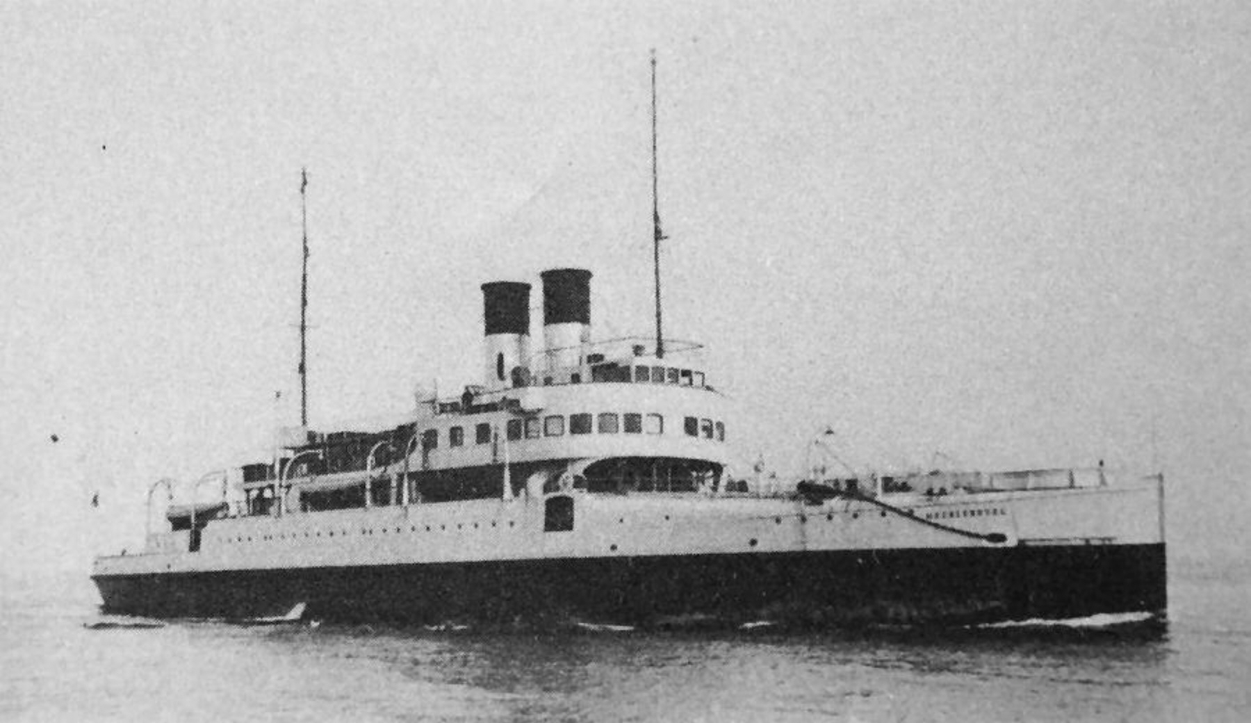 Eisenbahnfährschiff Mecklenburg (1903), Umbau 1926, Reederei der Deutschen Reichsbahn, Fährlinie Gedser-Warnemünde, verschrottet 1958.